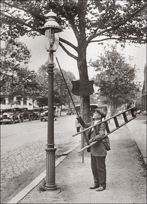 Allumeur de réverbères dans les rues de Londres dans au début du 20e siècle.